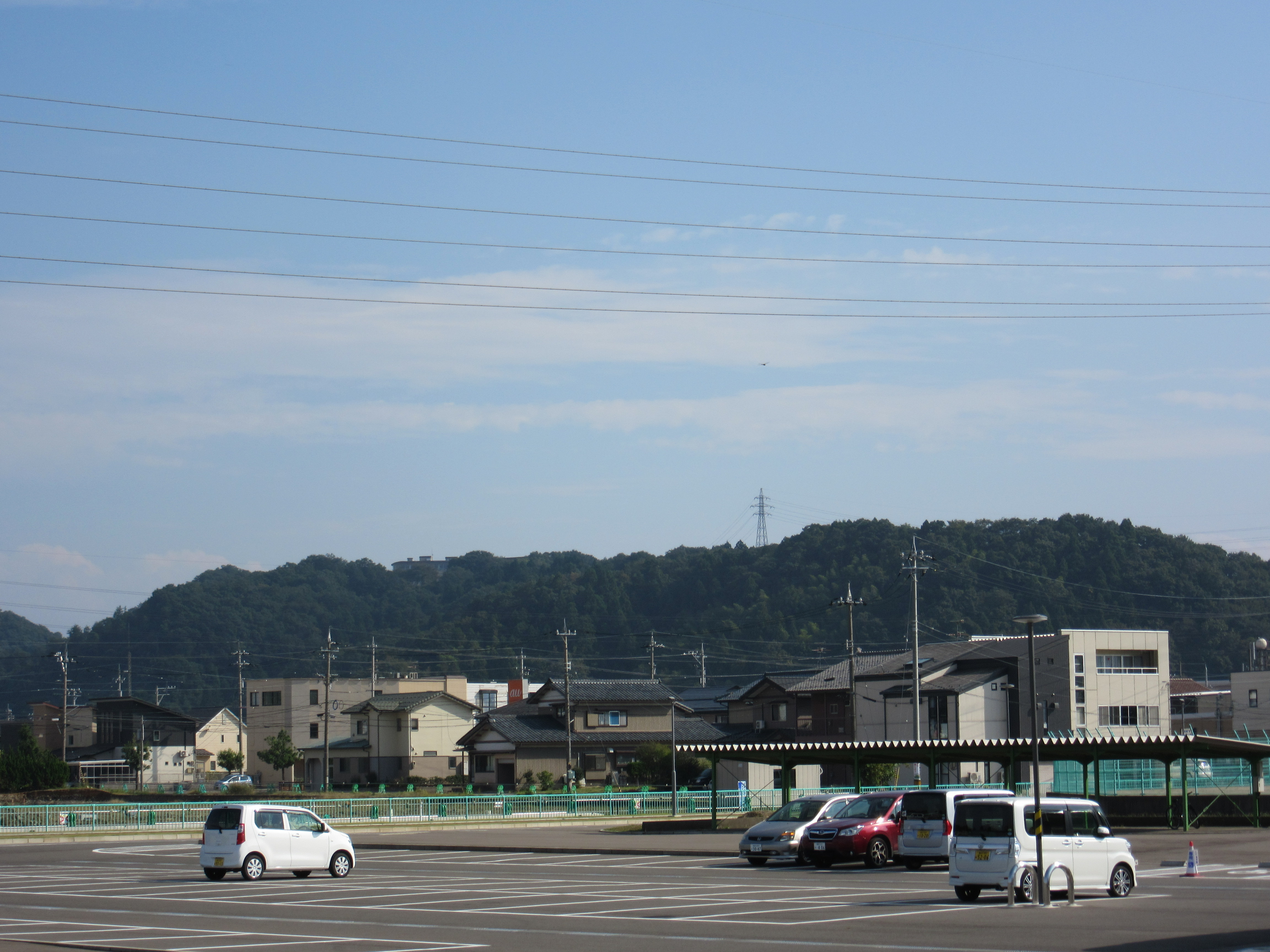 福井運動公園から見た兎越山